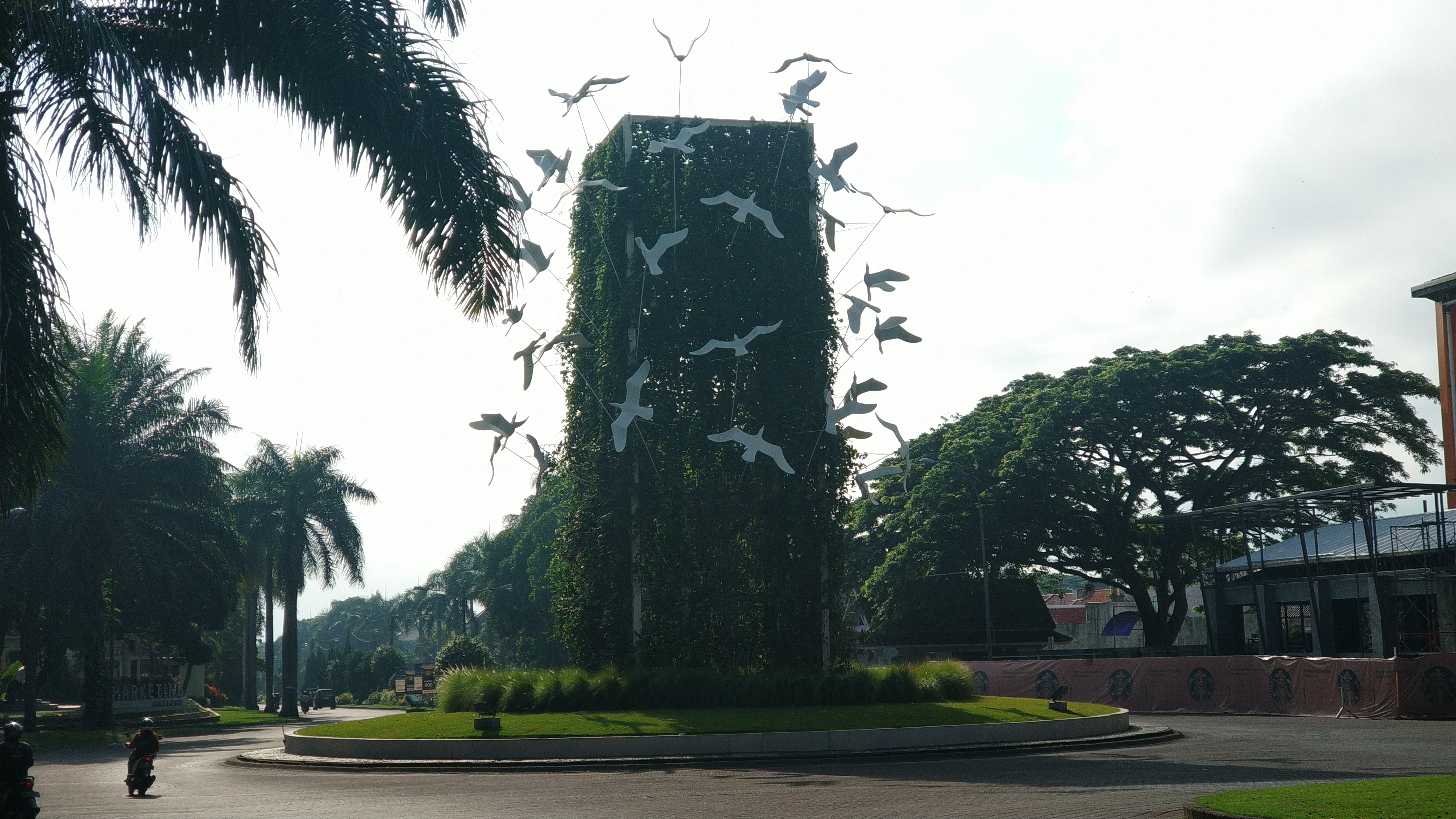 2018-12-01 Monumen Gerbang Perumahan Araya